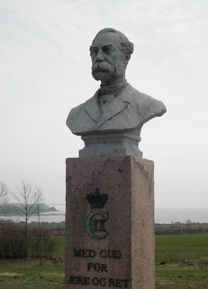 Titel: Denkmal für König Christian IX. von Dänemark Das Denkmal trägt die Inschrift Mit Gott für Ehre und Recht und steht bei den Düppeler Schanzen. Im Hintergrund ist die Flensburger Förde zu sehen und ein Teil der Insel Alsen. Düppel selber liegt in Jütland und gehört zur Stadt Sonderburg. Das Foto entstand am 140. Jahrestag der Schlacht zwischen Preußen und Dänemark dort. Christian IX. war zu der Zeit der König von Dänemark.